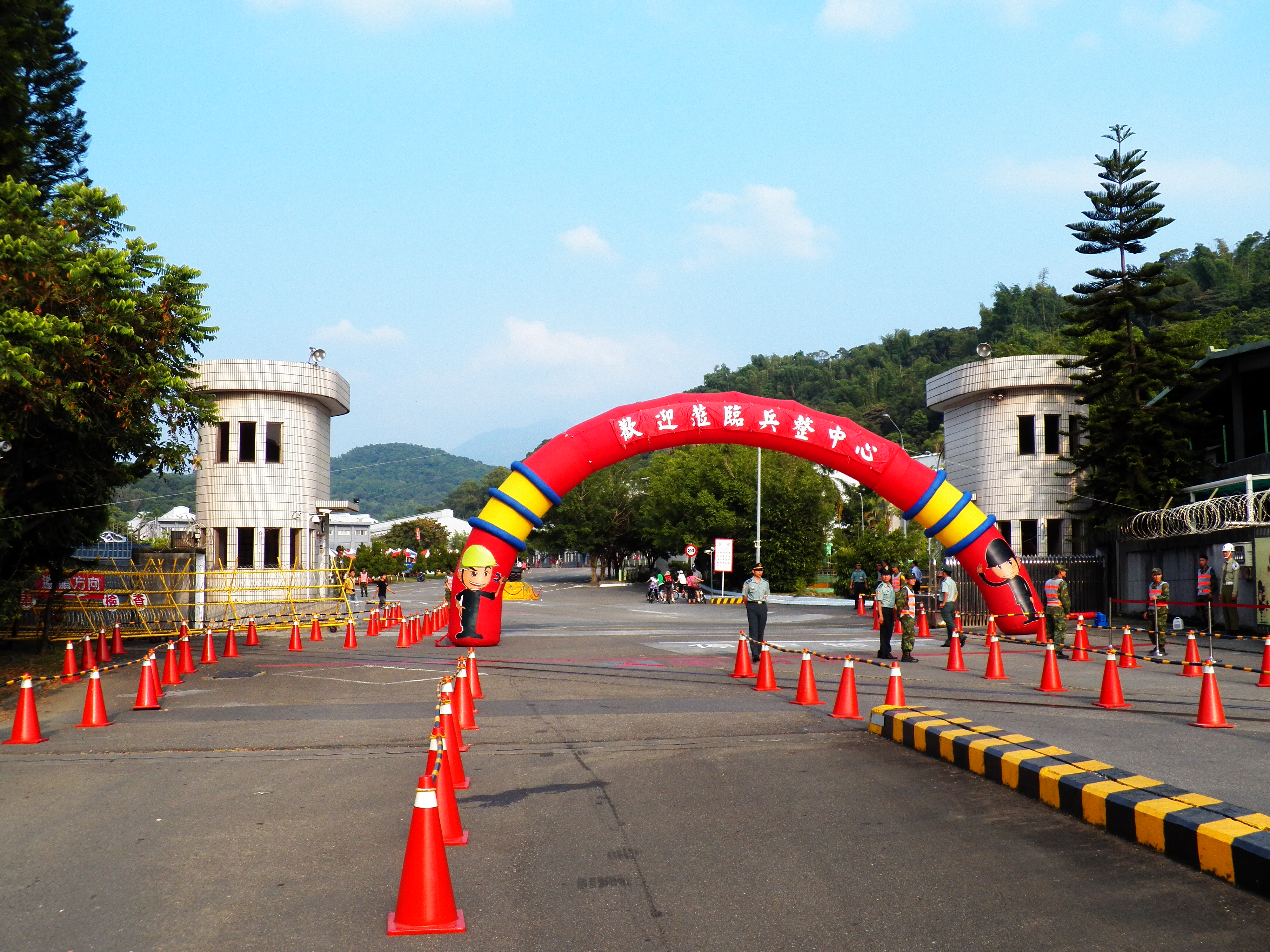 聯勤兵整中心正門，攝於2012年營區開放活動。